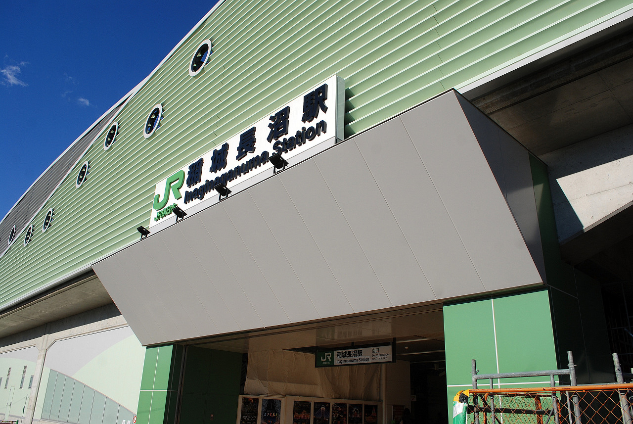 JR稲城長沼駅南口